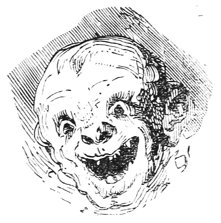 Illustration du Dictionnaire infernal de Jacques Auguste Simon Collin de Plancy par Louis Le Breton, 6eme édition, 1863.